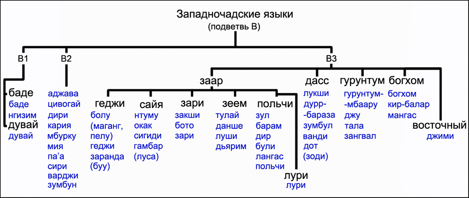 Схема западночадских языков подветви B (баучи-баде), составленная на основе классификации, опубликованной в издании Ethnologue. Источник: Lewis, M. Paul, Gary F. Simons, Charles D. Fennig: Afro-Asiatic. Chadic. West. Ethnologue: Languages of the World (19th Edition). Dallas: SIL International (2016).